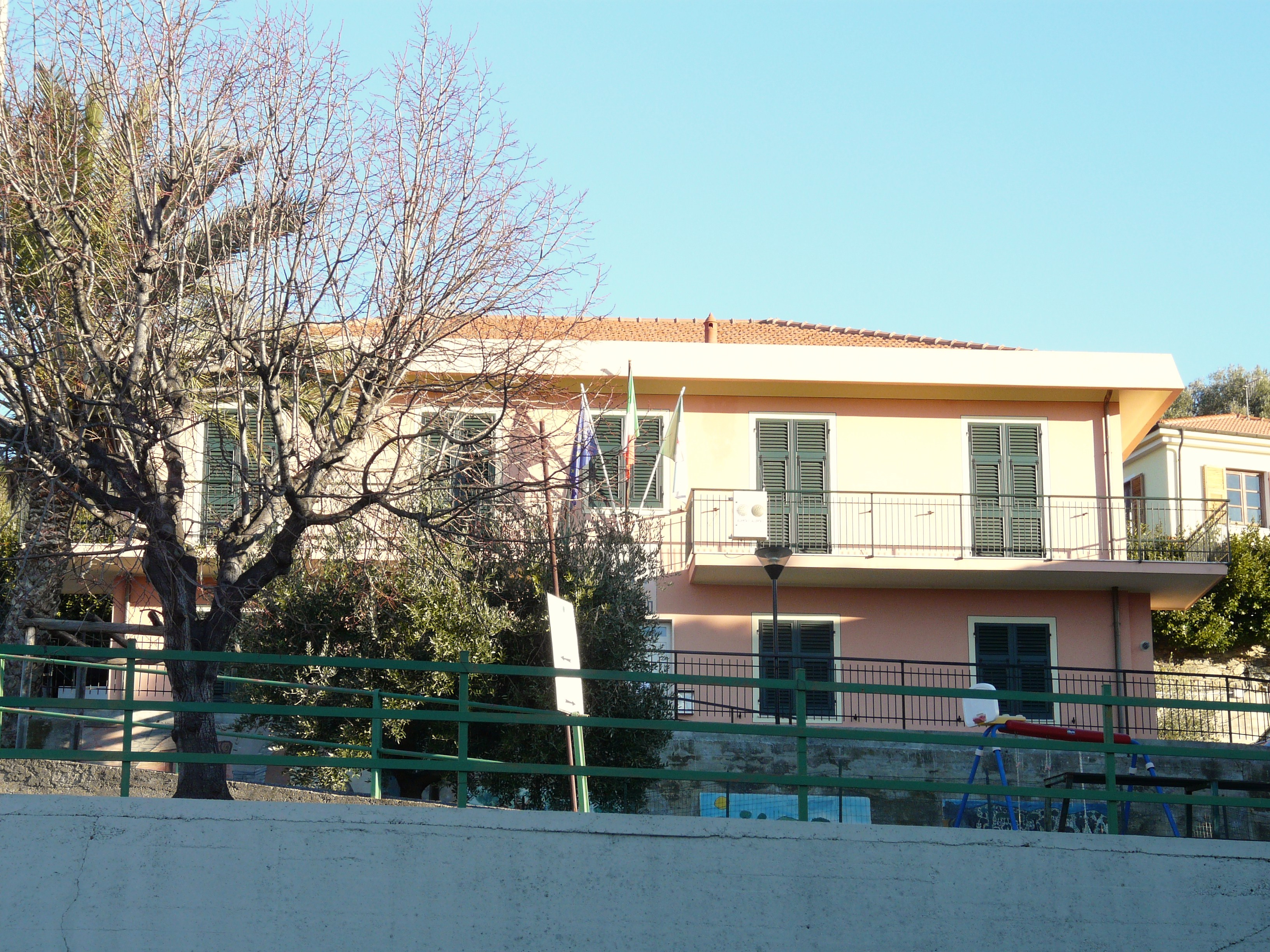 Municipio di Arnasco, Liguria, Italia